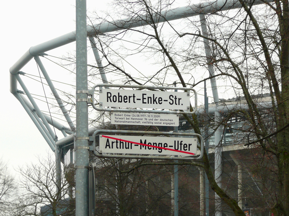 Straßenschild Robert Enke Straße in Hannover